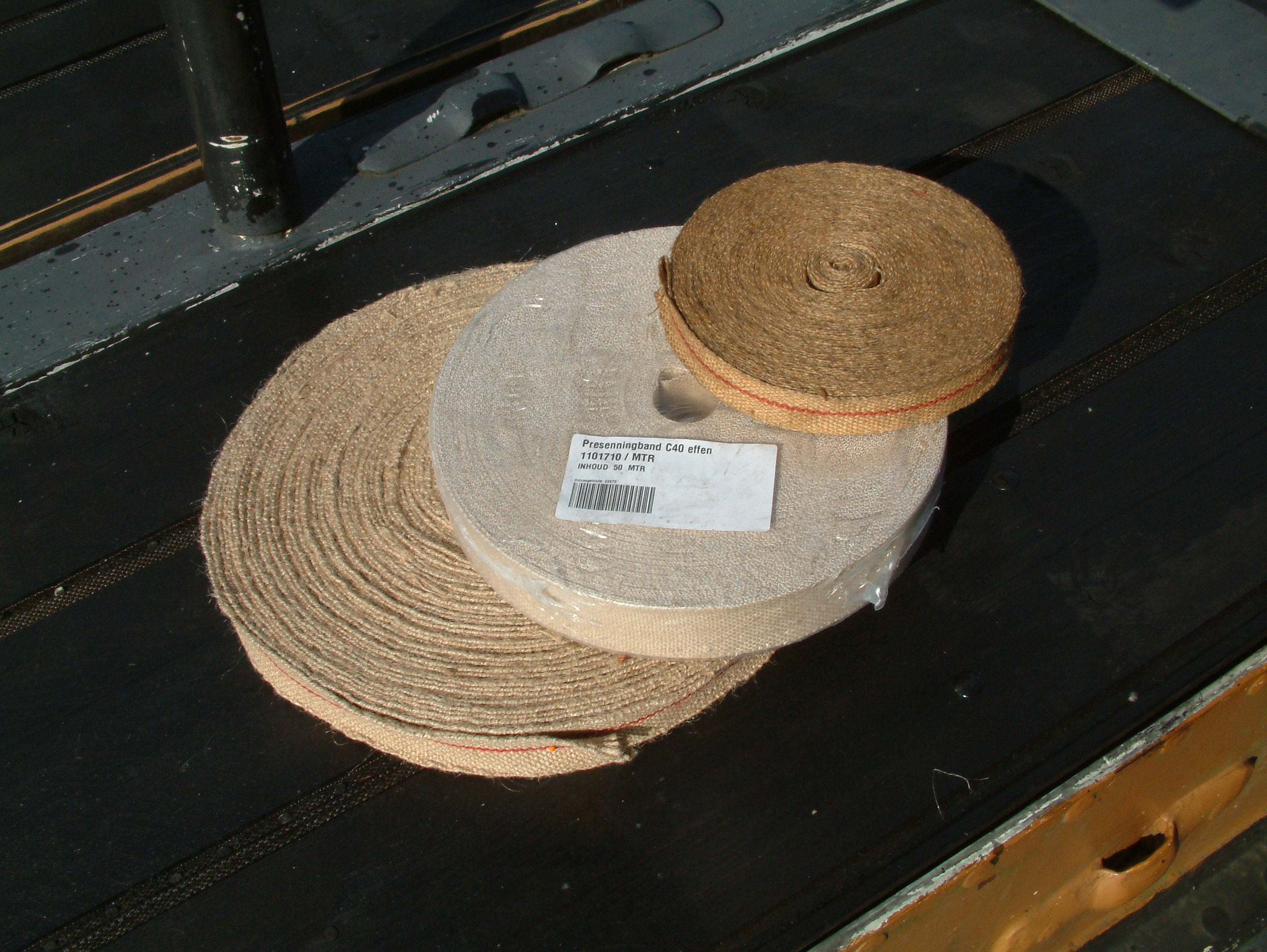 Oud, nieuw en museum presenningband